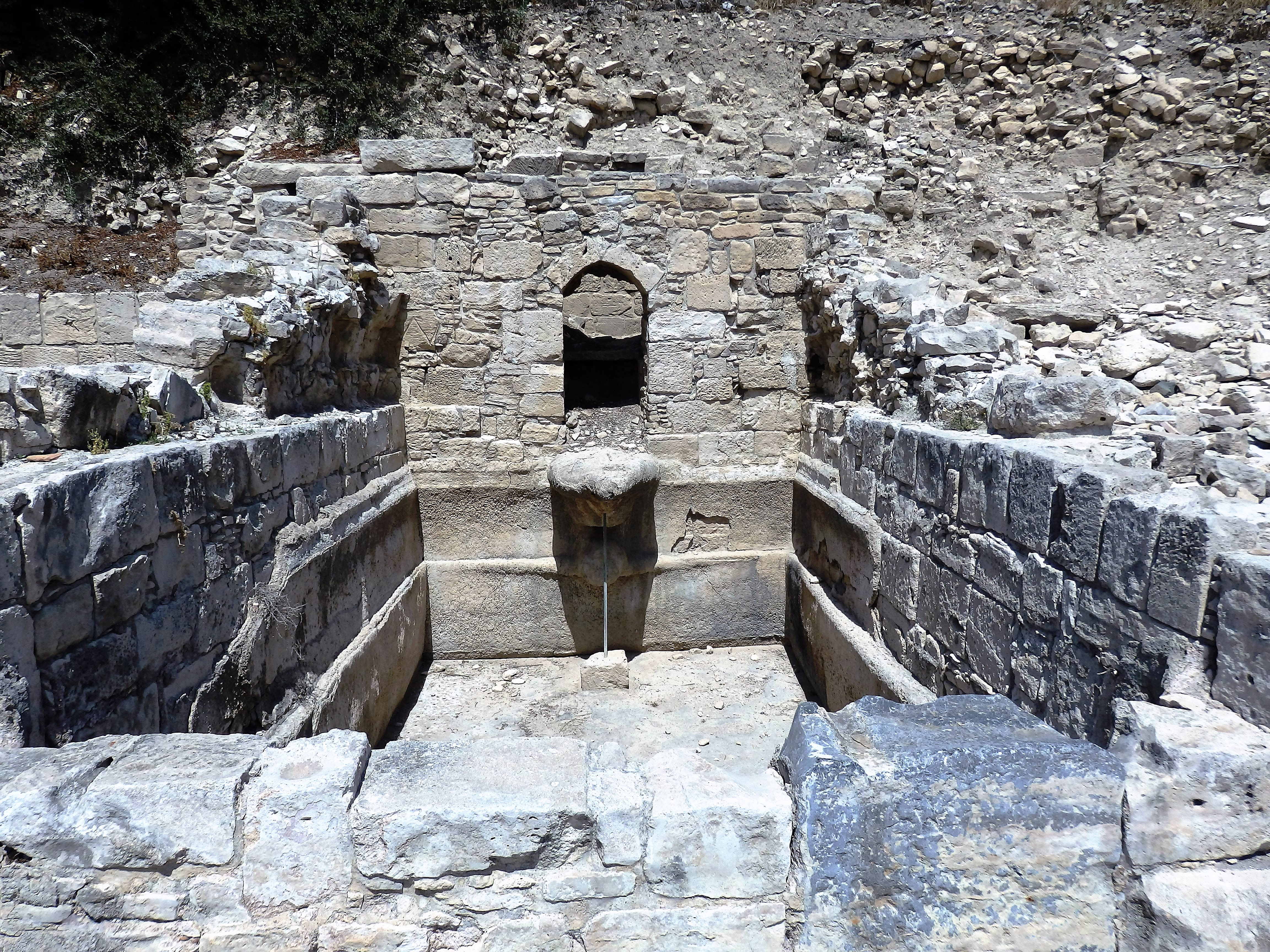 Amathous, Nyphäum